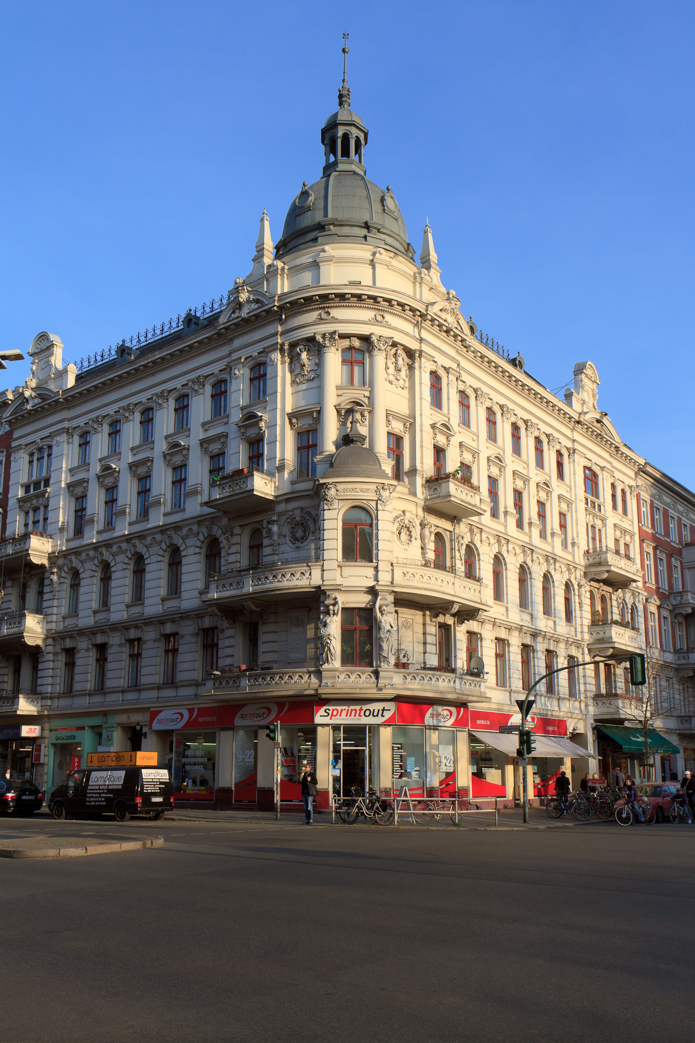 Grunewaldstraße 78, Akazienstraße 18 in Berlin-Schöneberg.